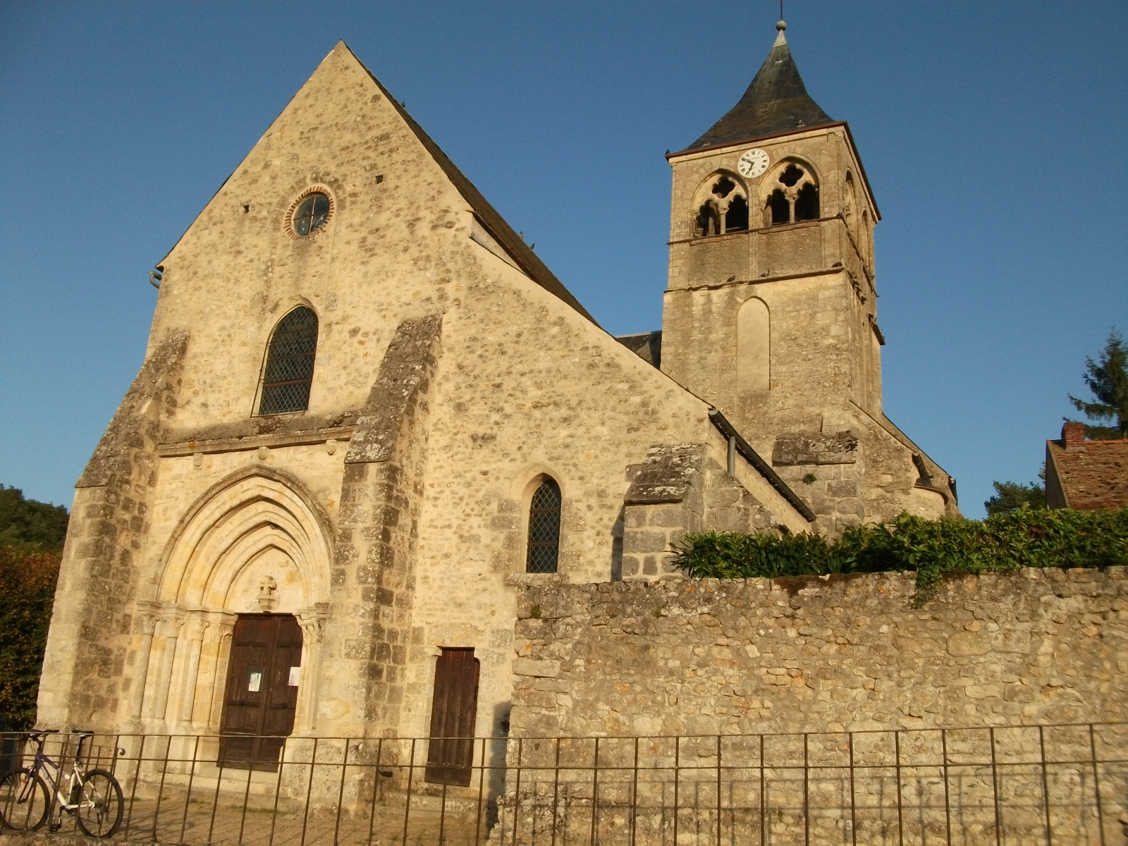 la façade de l'église de Boissy-la-Rivière.